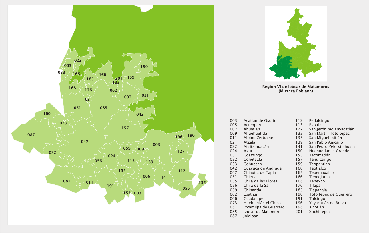 Mapa de la región de la Mixteca Poblana, Puebla, México